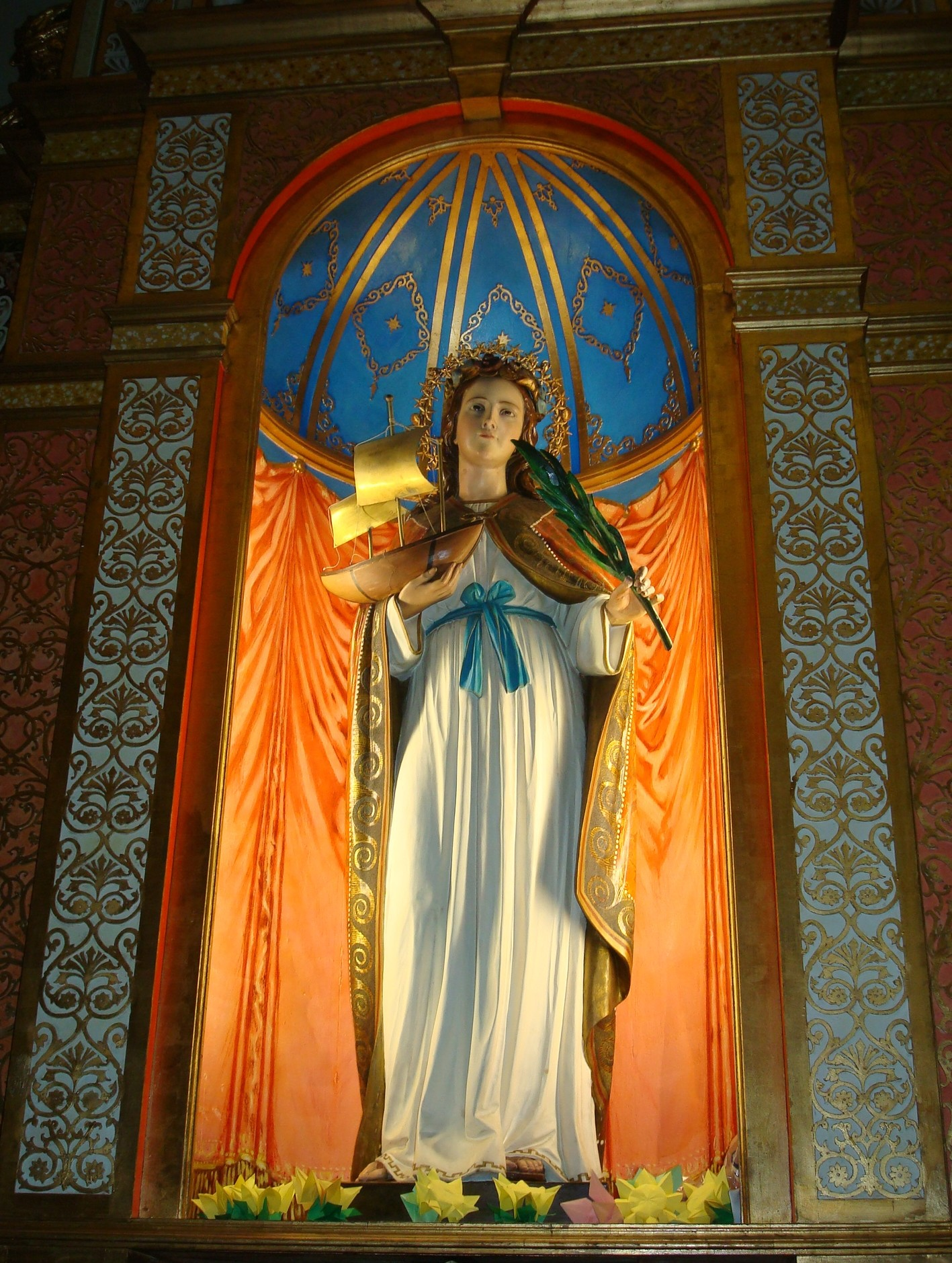 Santa Fermina dans la cathédrale saint François d'Assise à Civitavecchia